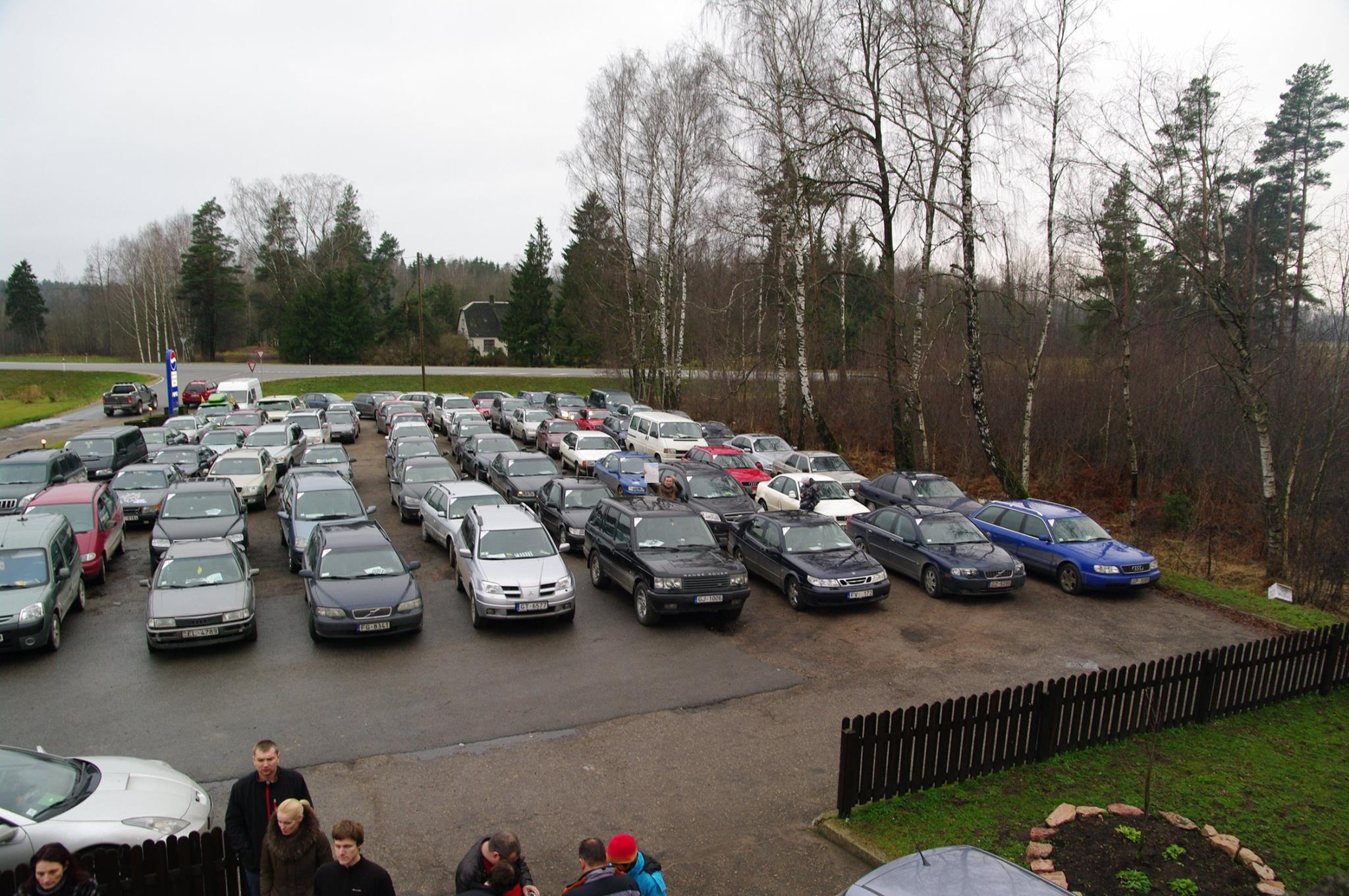 Pirmo autofotoorientēšanās sacensību dalībnieki startā.